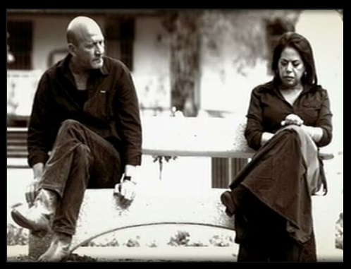 מרגלית צנעני ועמוס לביא בקליפ של מרגול עץ ירוק מפלסטיק